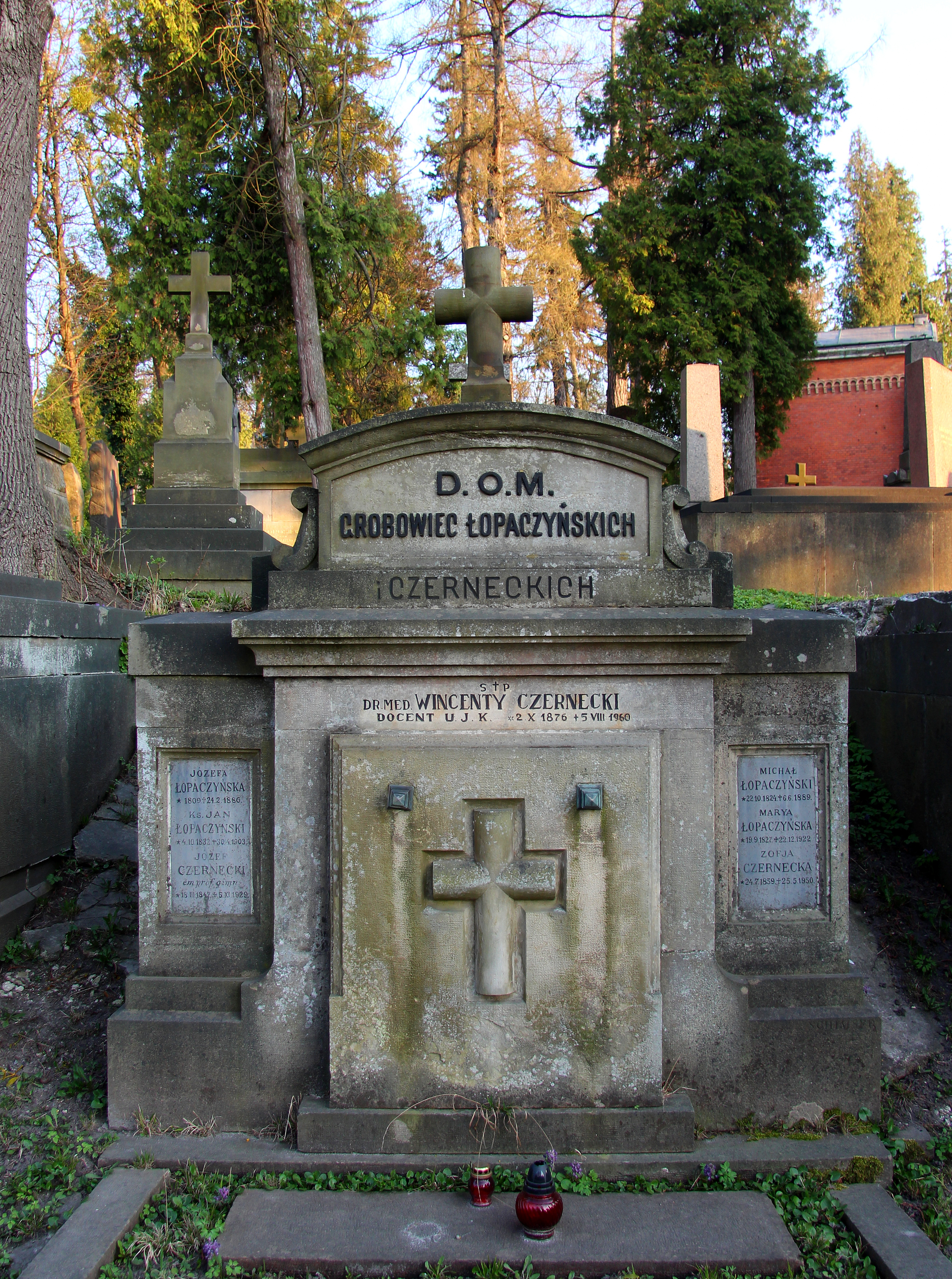 Гробівець Лопачинських.Личаківський цвинтар ,поле № 1.